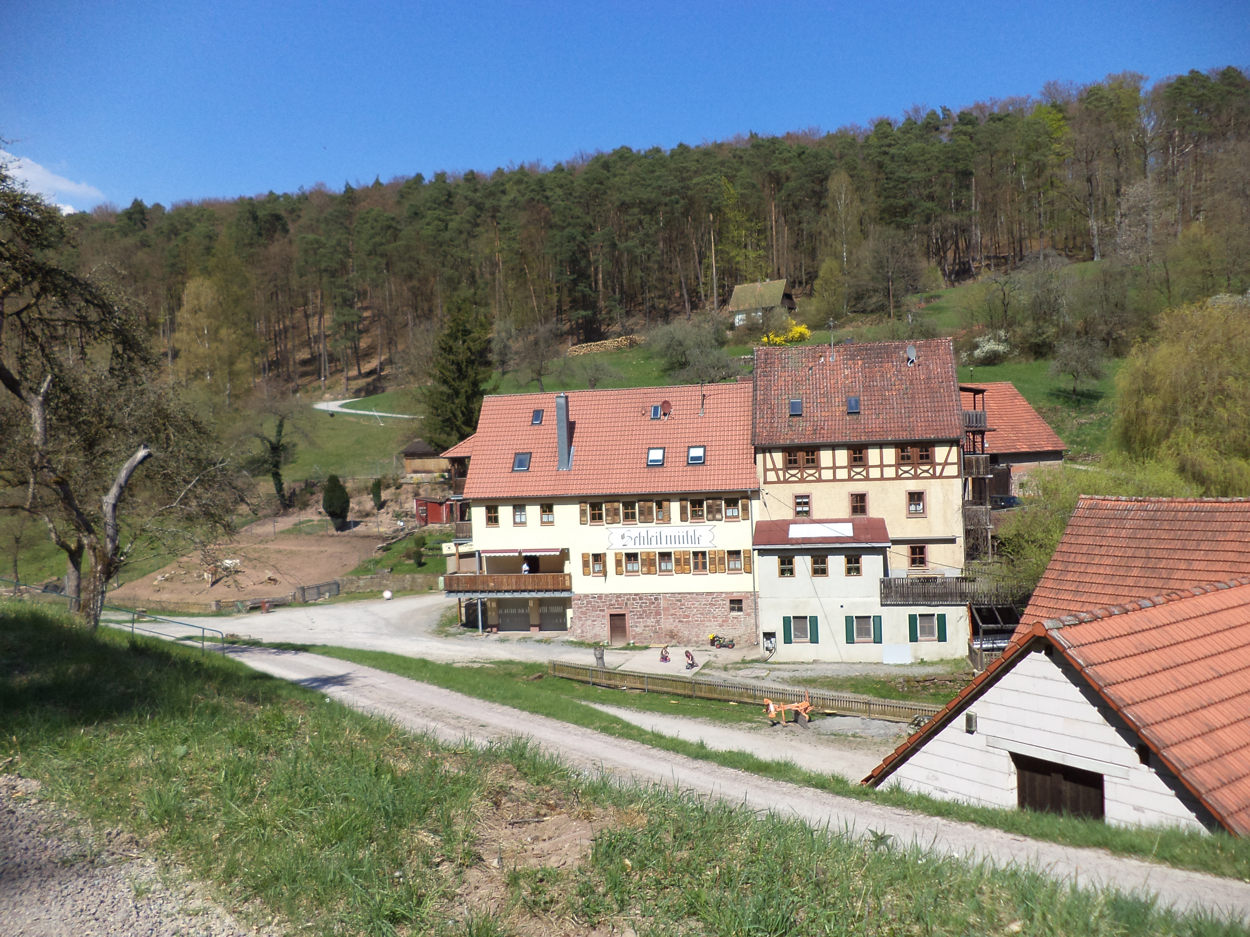 Die Schleifmühle im Mühlental (Schleifbachtal) bei Hasloch